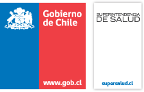 Logo del gobierno de Chile en conjunto de el logotipo de la Superintendencia de salud.